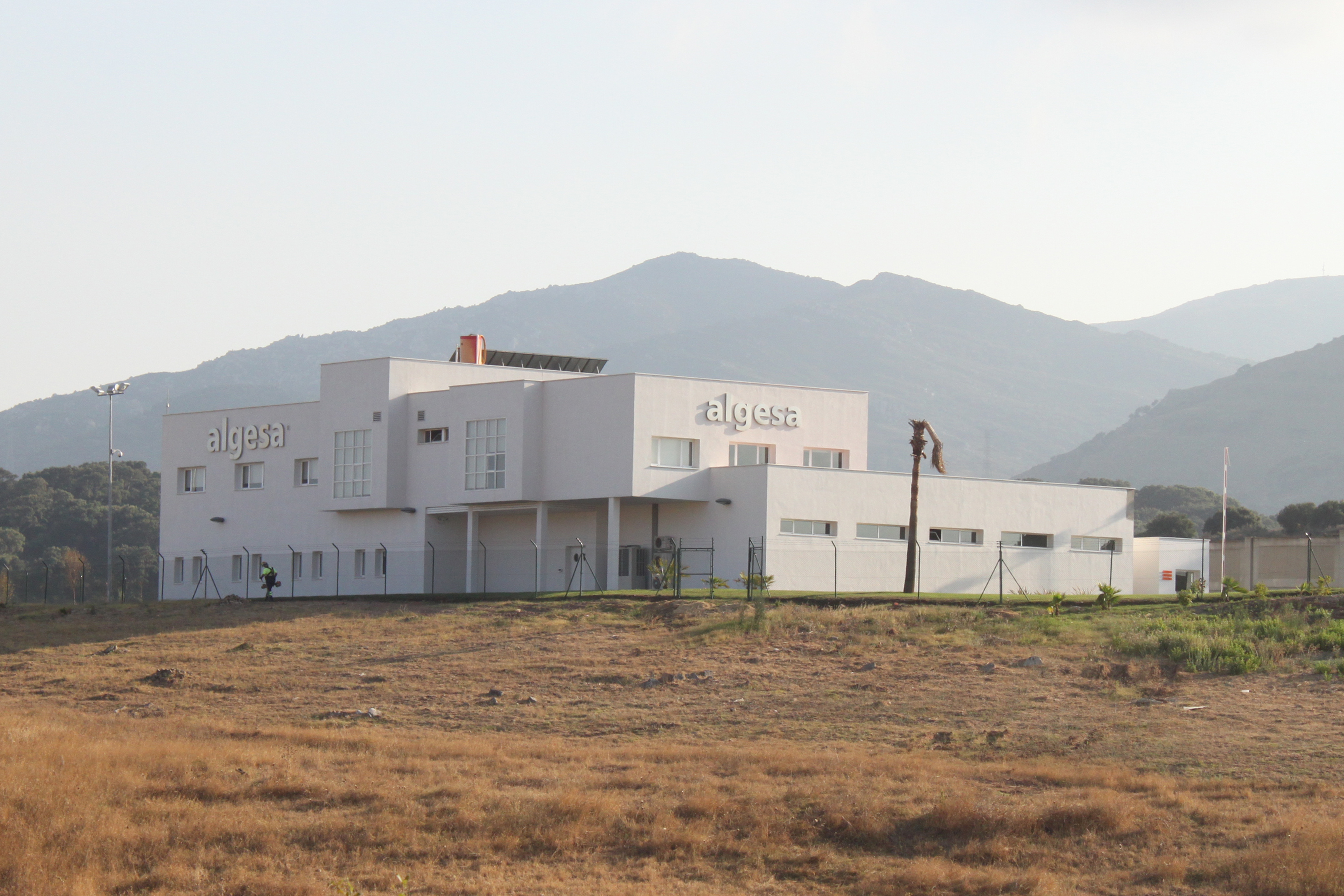 Sede principal de la empresa municipal ALGESA (Actividades de Limpieza y Gestión S.A) en la localidad española de Algeciras.